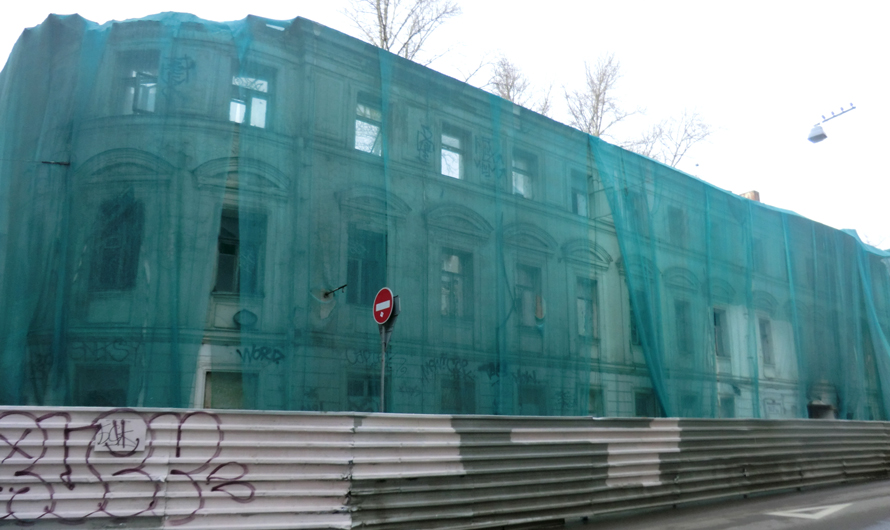 Боковой фасад здания школы Матвея Казакова в Москве по адресу Малый Златоустинский переулок, 1/11.